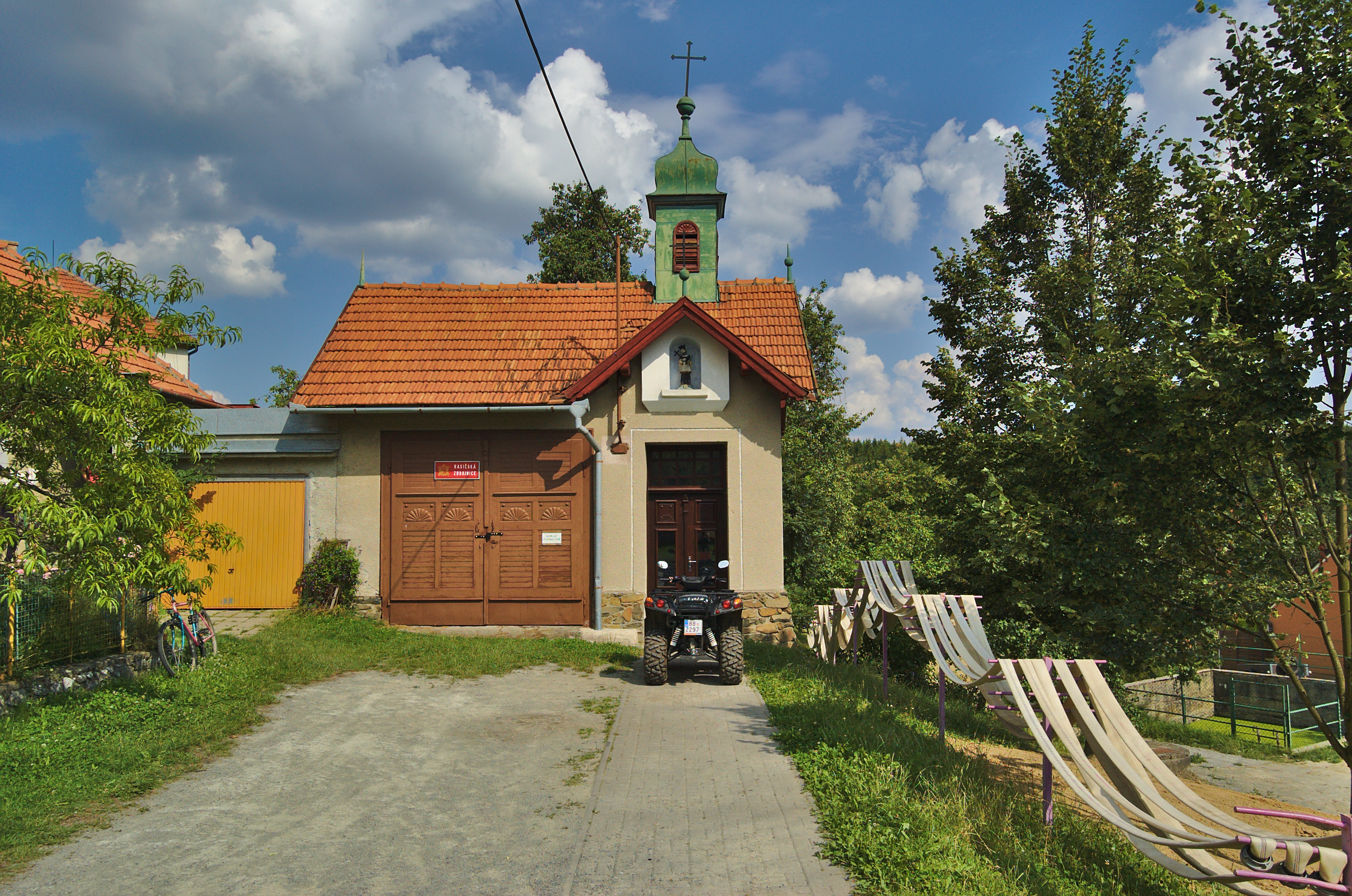 Hasičská zbrojnice, Housko, Vysočany, okres Blansko